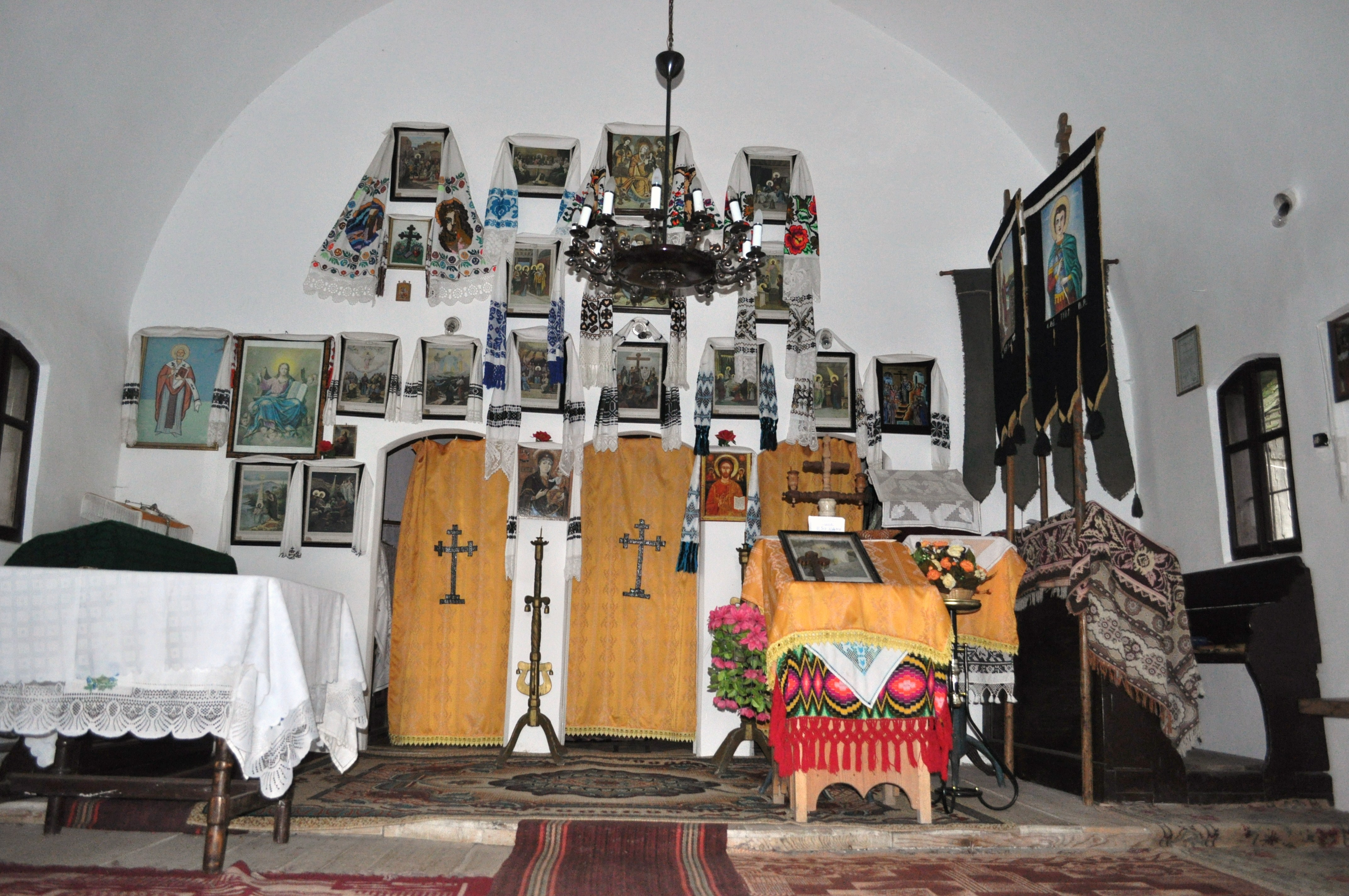 Biserica de lemn „Înălțarea Sfintei Cruci” din Bălcești, județul Cluj